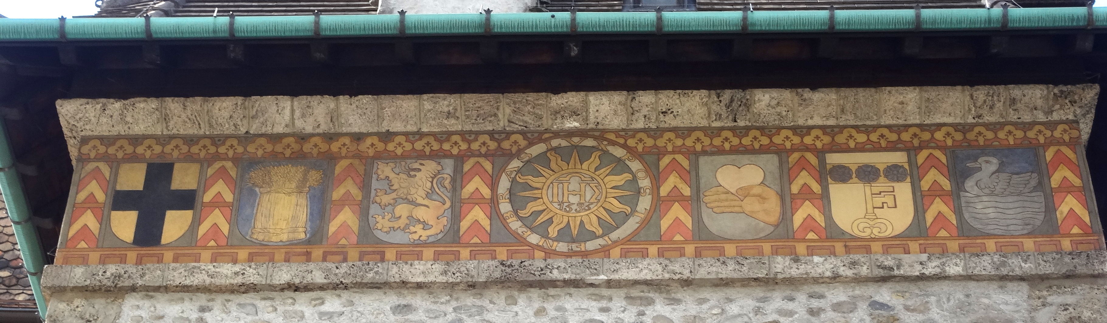 Tour du Molard (Genève), frise Est.